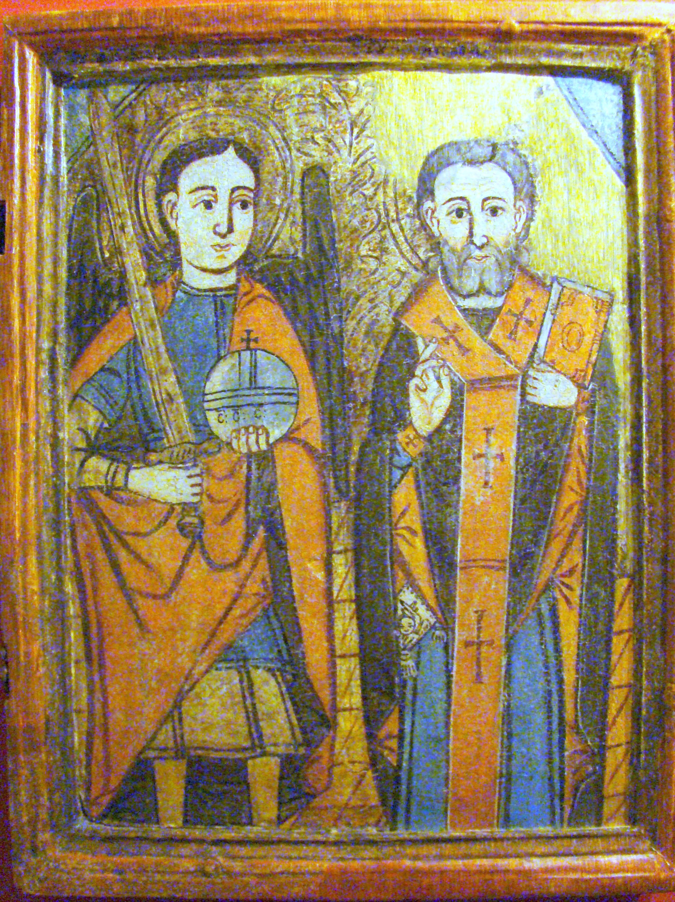 Icoană de Alexandru Ponehalschi (colecția Arhiepiscopiei Clujului)